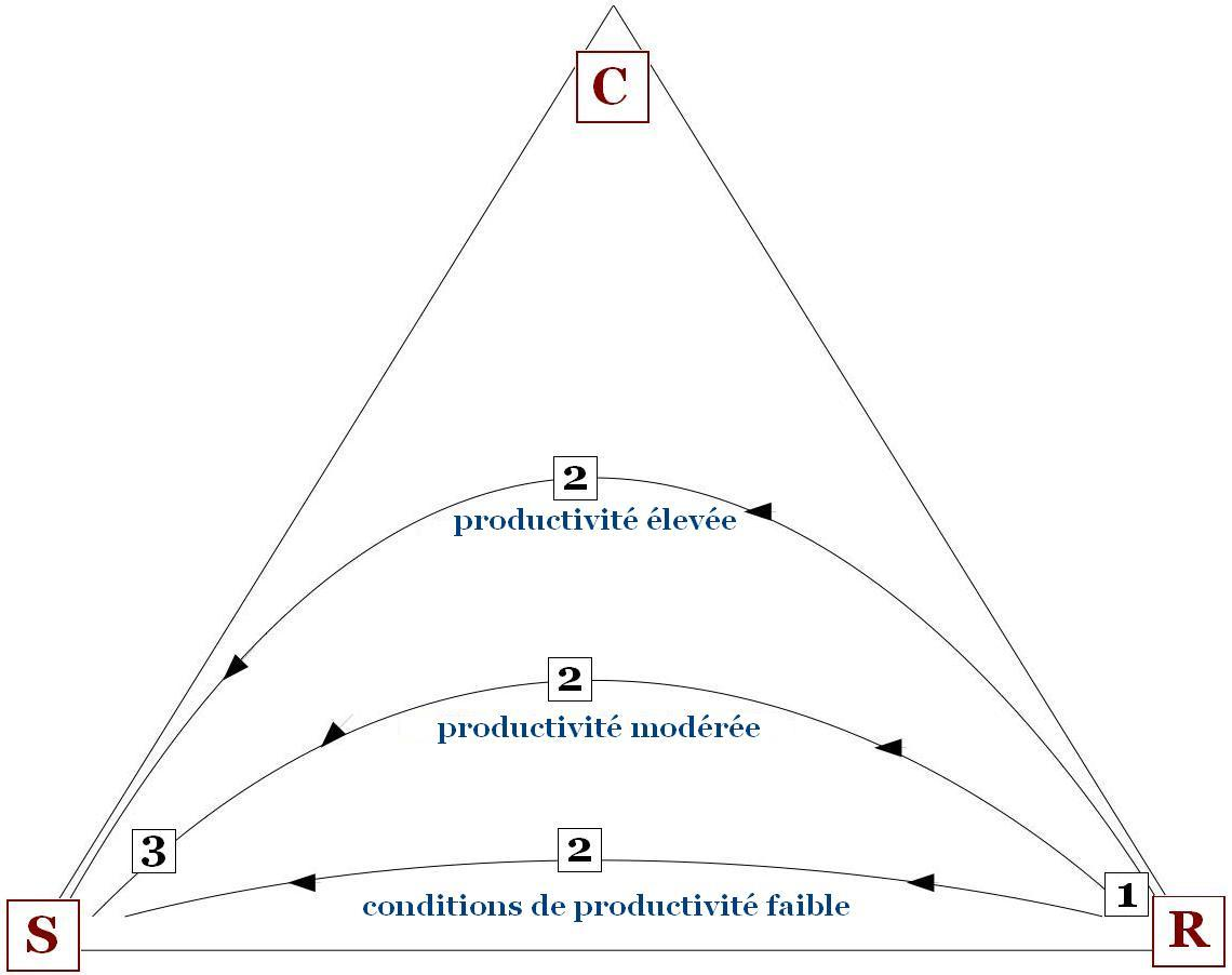 Trois types de succession représentées dans le triangle CSR.